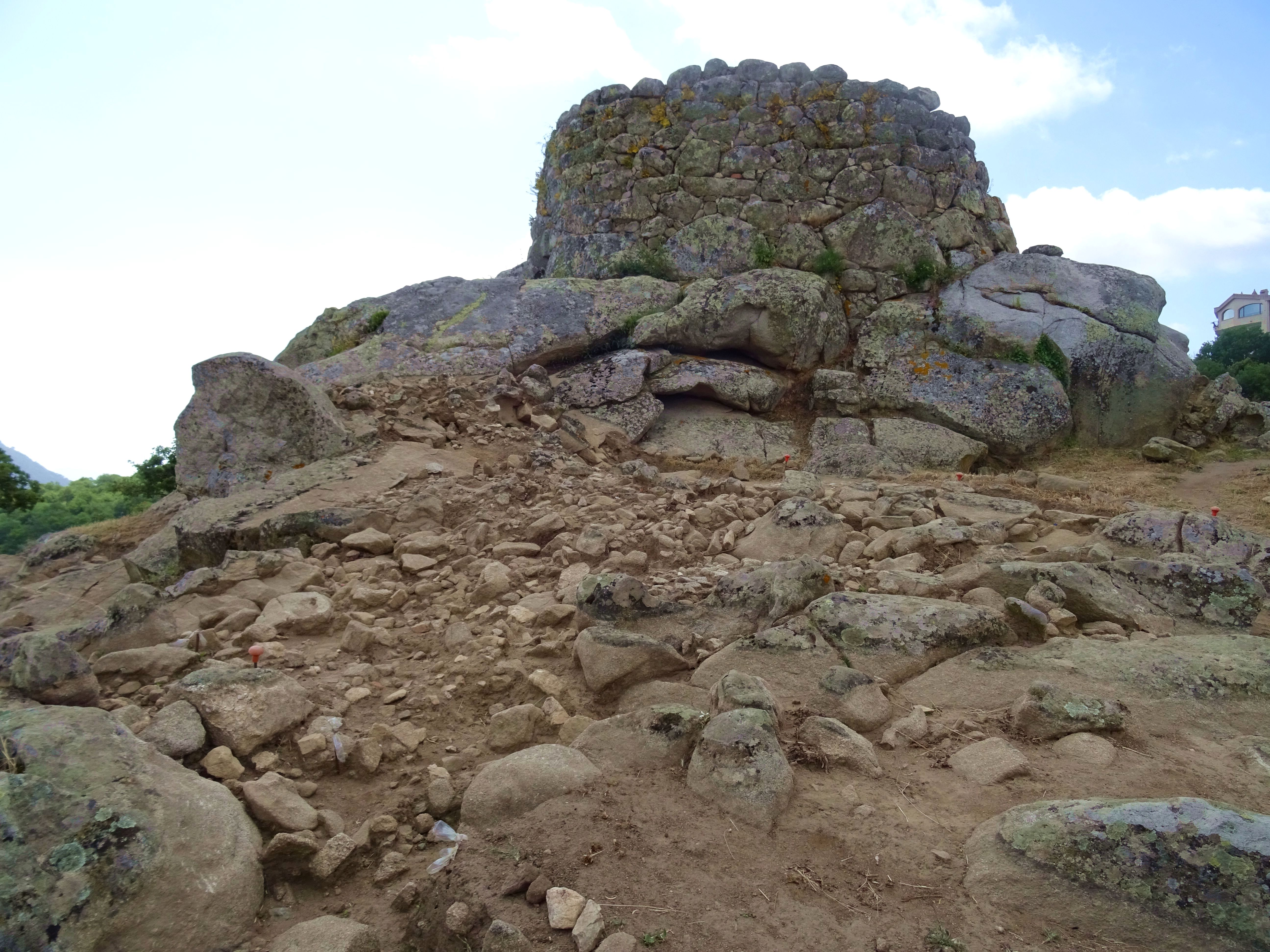 Nuraghe di Tanca Manna a Nuoro. This is a photo of a monument which is part of cultural heritage of Italy.